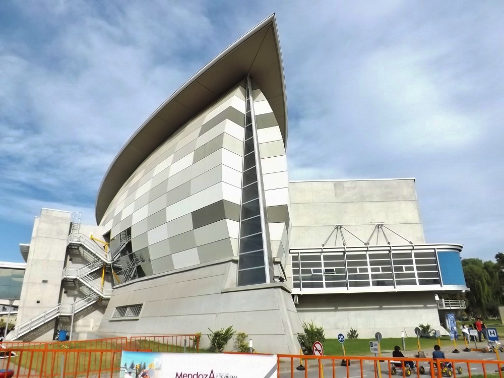 Espacio Julio Le Parc, en Guaymallén (Mendoza, Argentina).